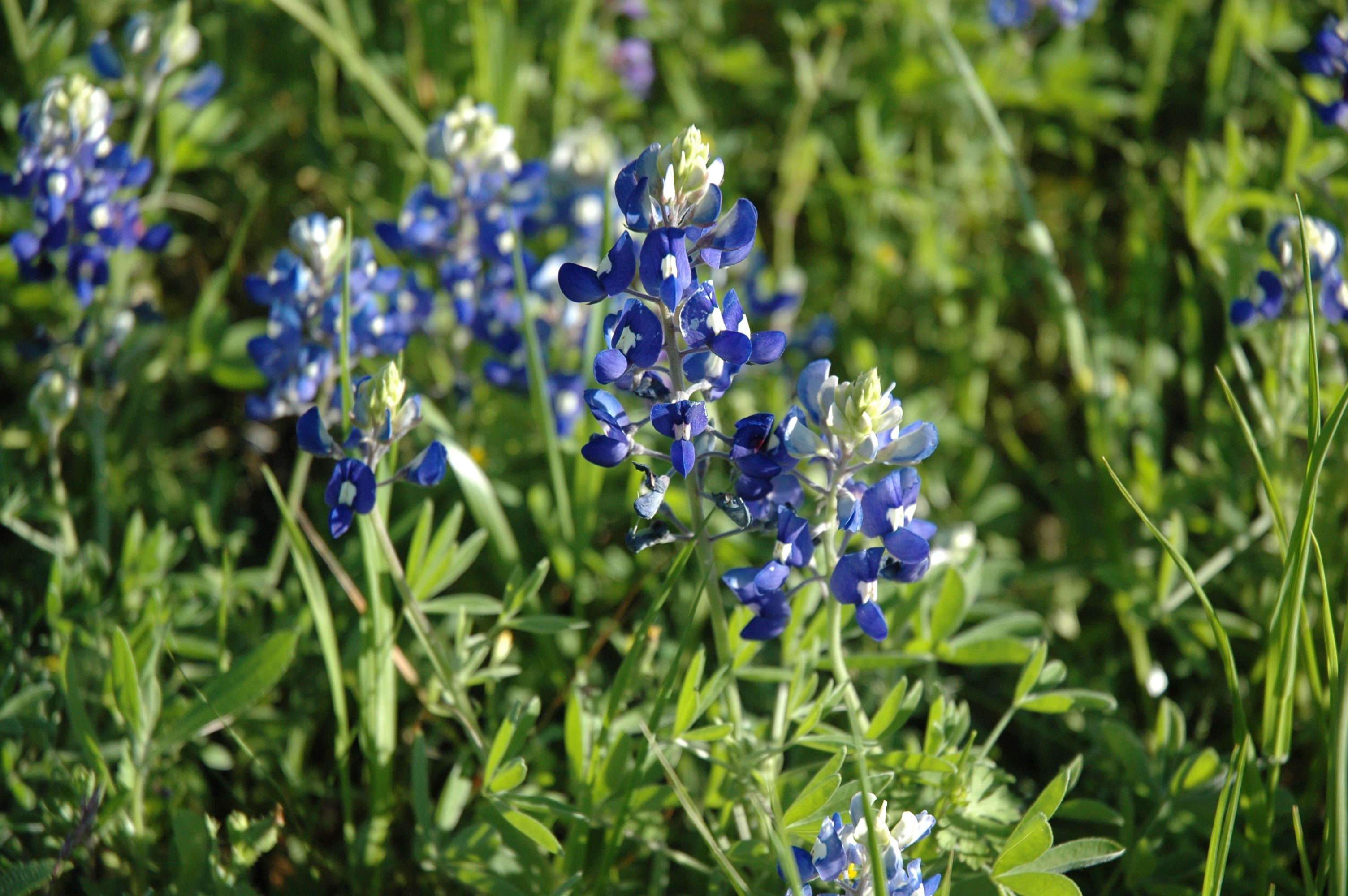 Bluebonnets